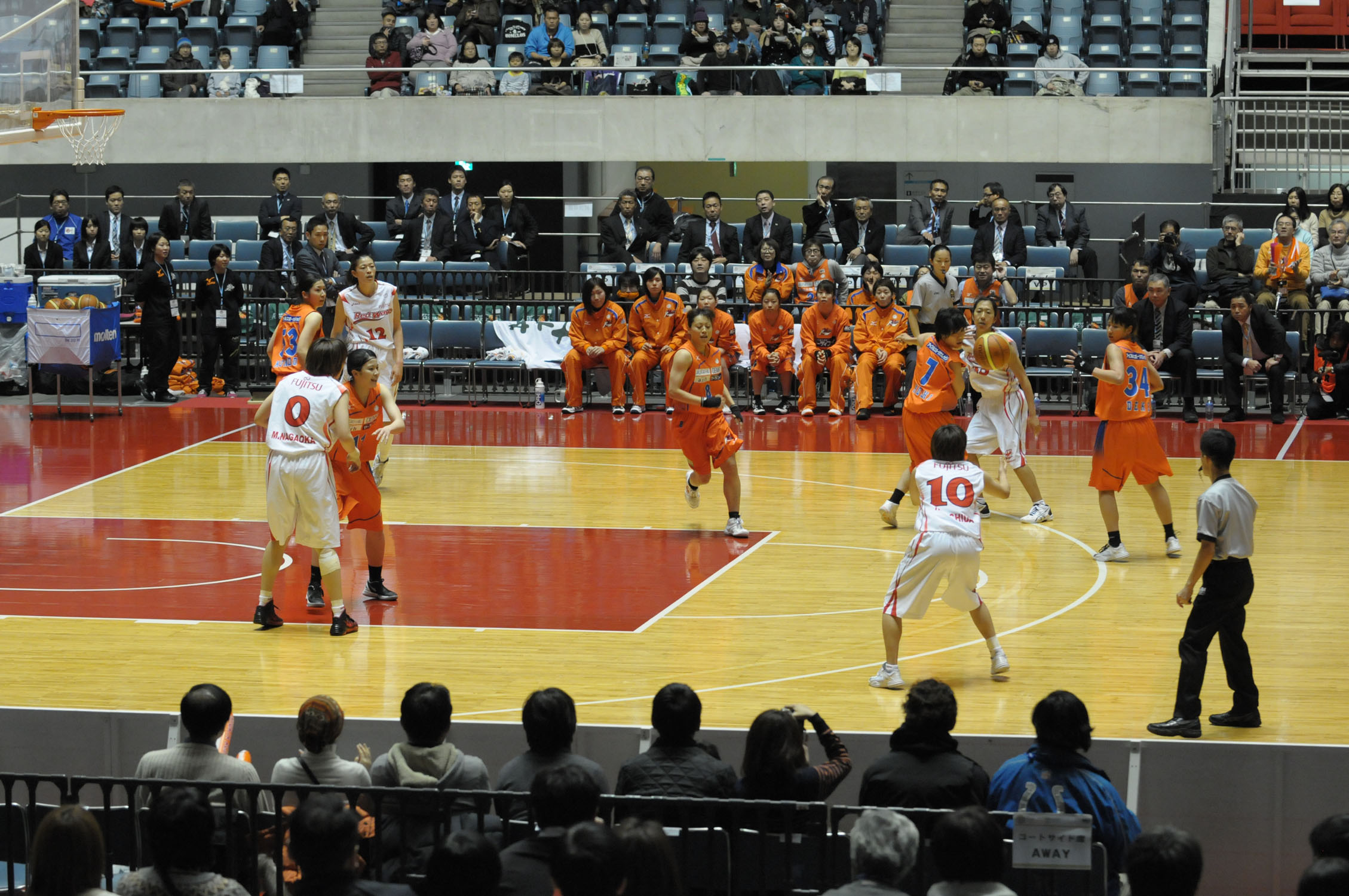 2014年全日本総合バスケットボール選手権大会準々決勝、富士通レッドウェーブス対新潟アルビレックスBBラビッツ。代々木第一体育館で。